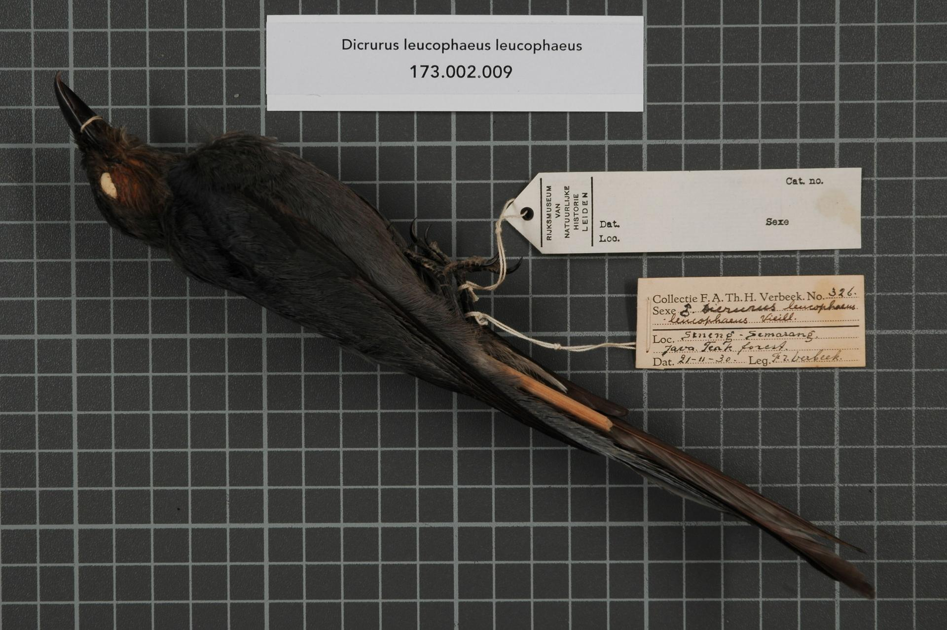 Dicrurus leucophaeus leucophaeus Vieillot, 1817